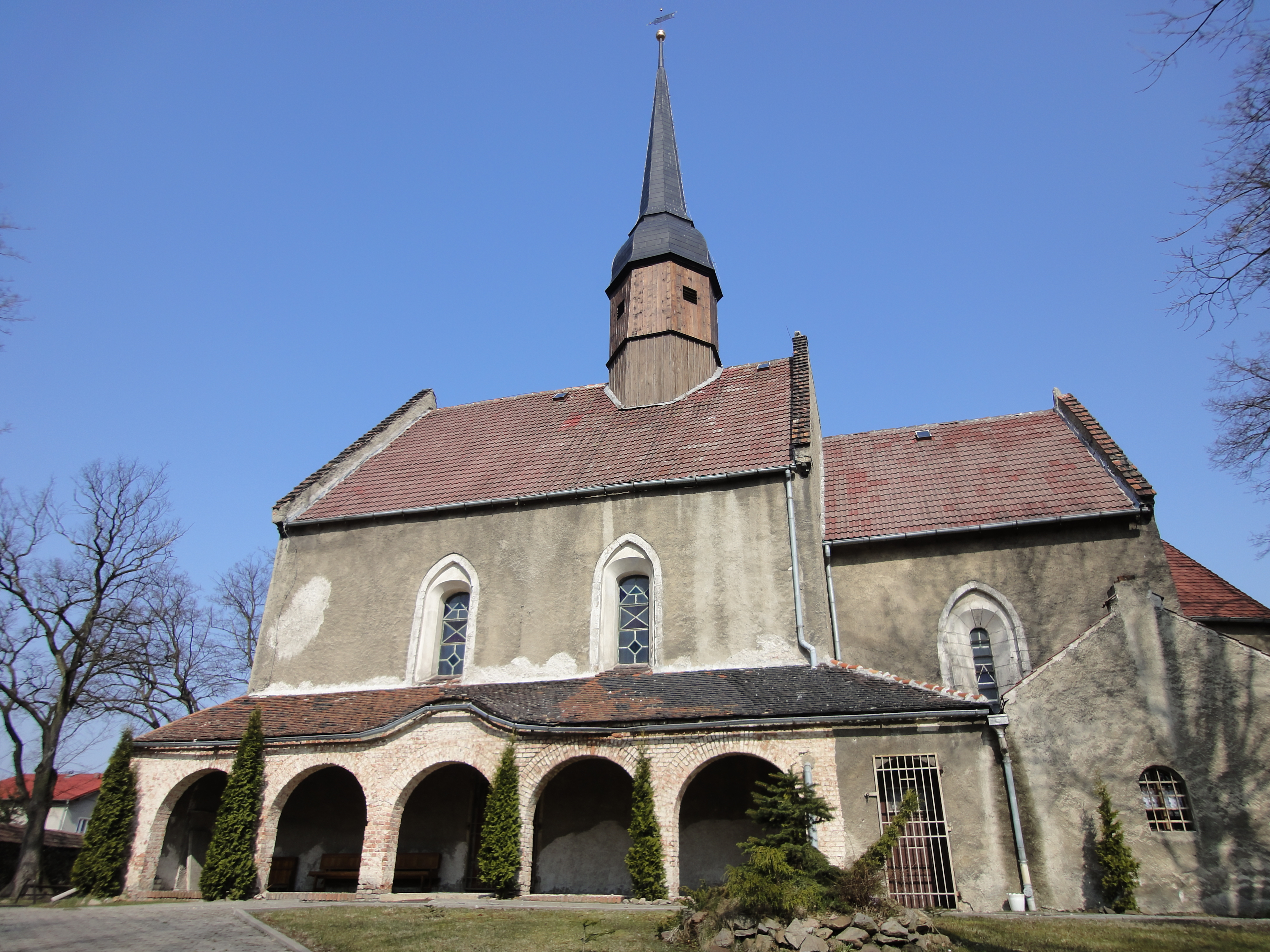 Jędrzychowice w powiecie zgorzeleckim - kościół pw. Narodzenia NMP.